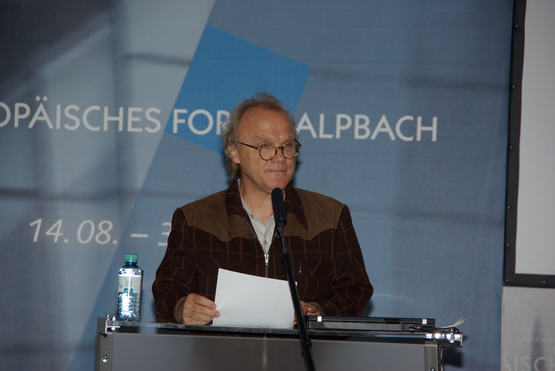 Michael Köhlmeier beim Forum Alpbach 2008